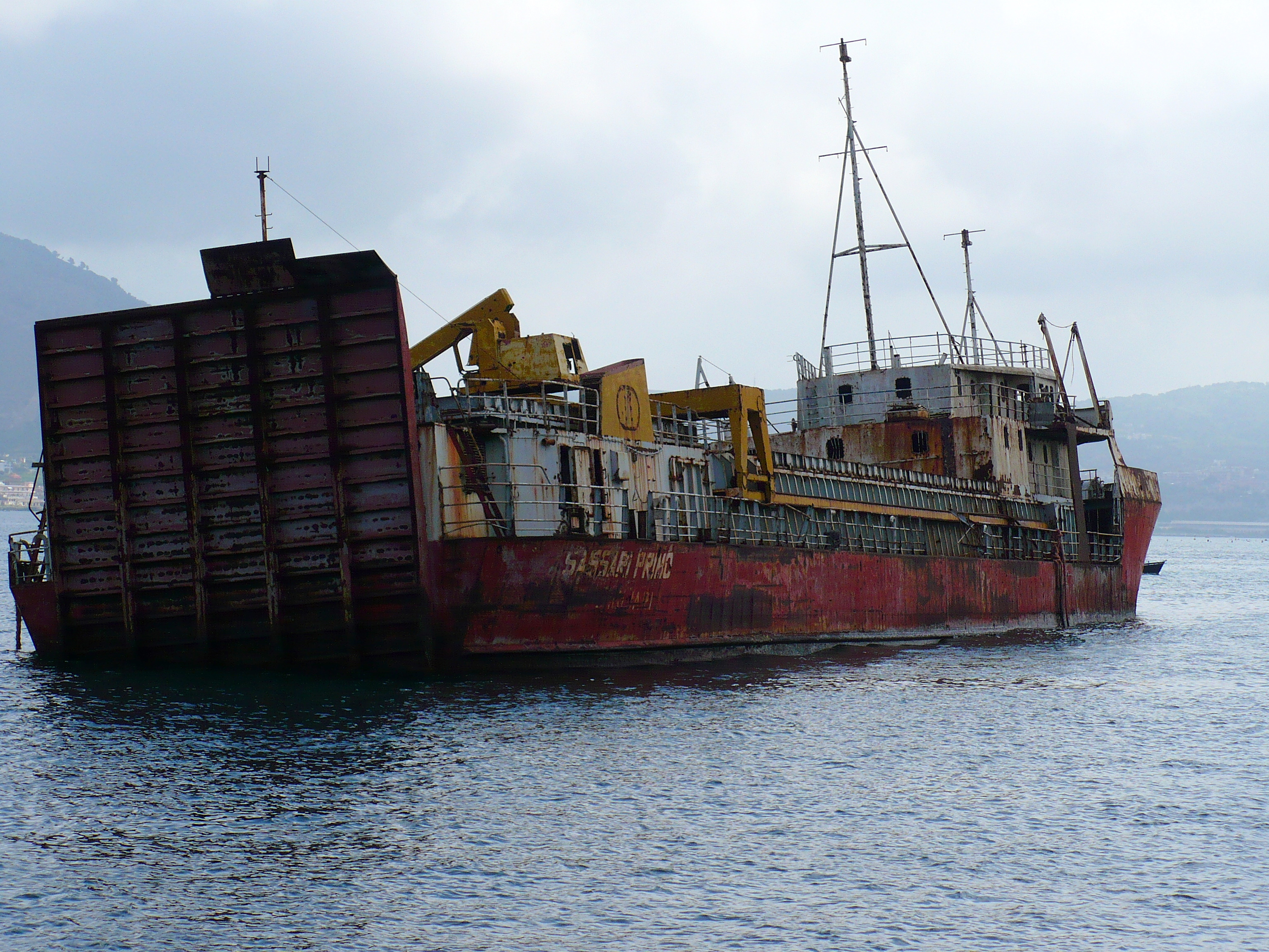 relitto arenato presso la costa di Baia (Napoli). Autore foto: Roberto De Martino